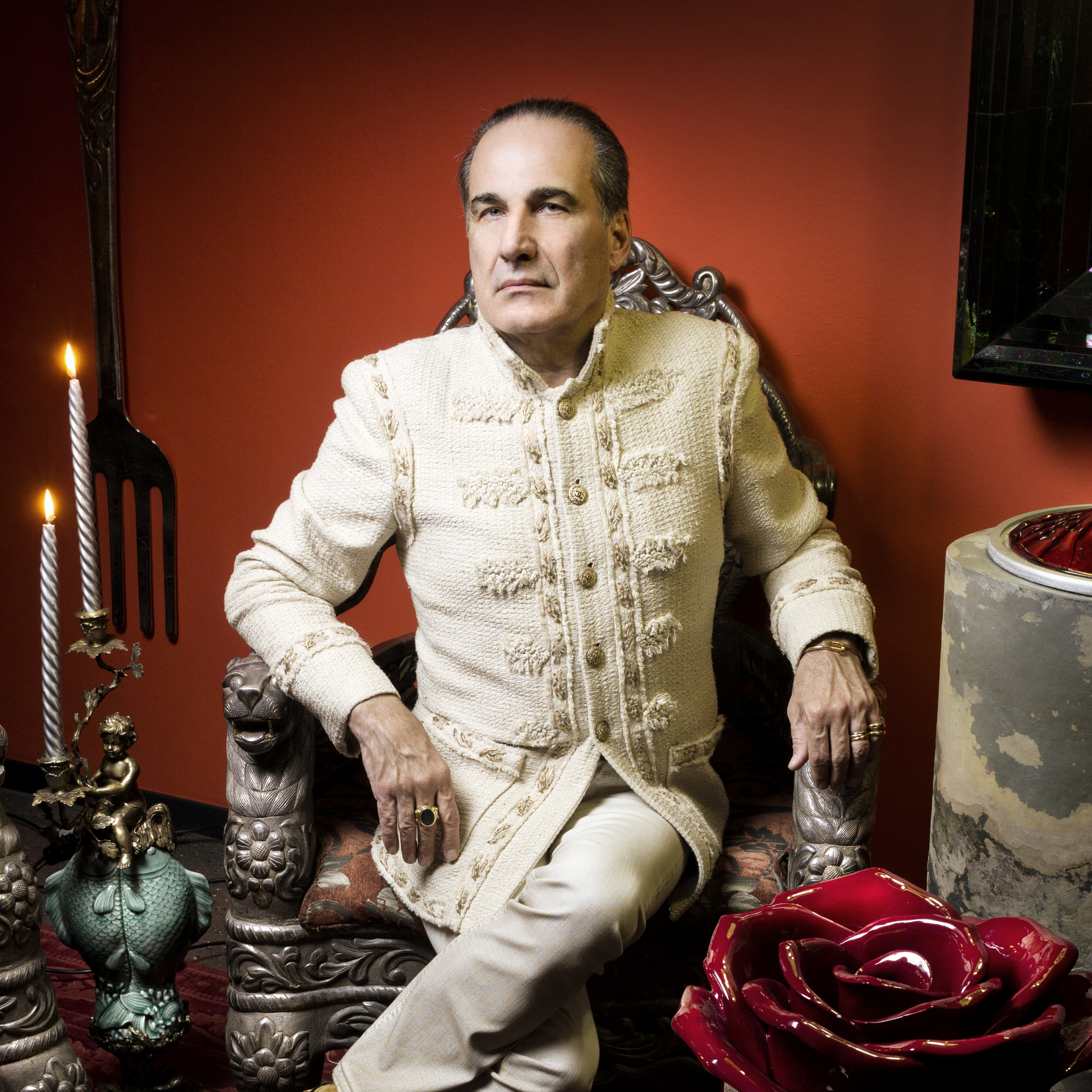 Carlo Rampazzi (by Fredi Marcarini, 2013)